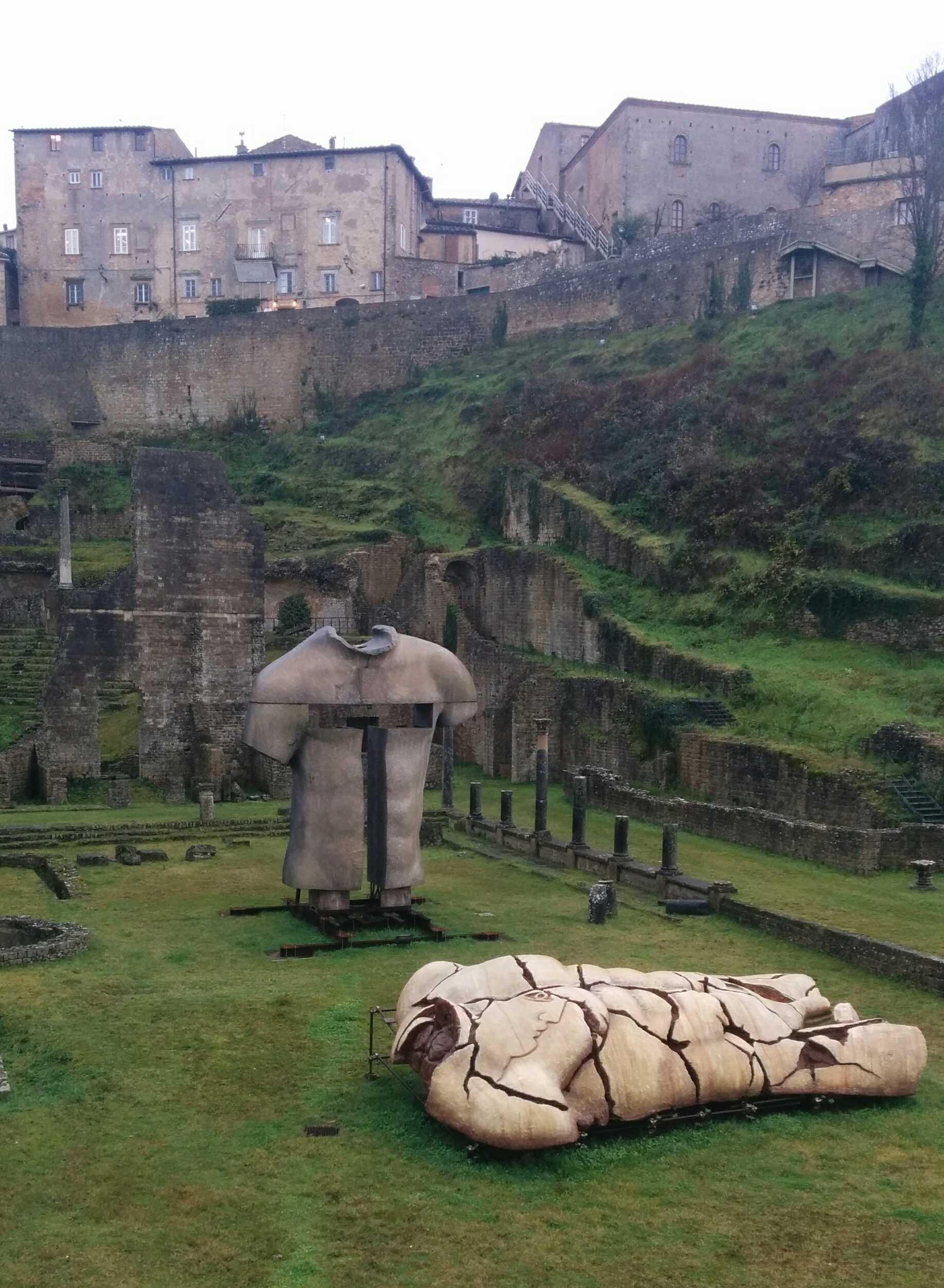 Sculture nel Teatro Romano, Volterra, 2015/16